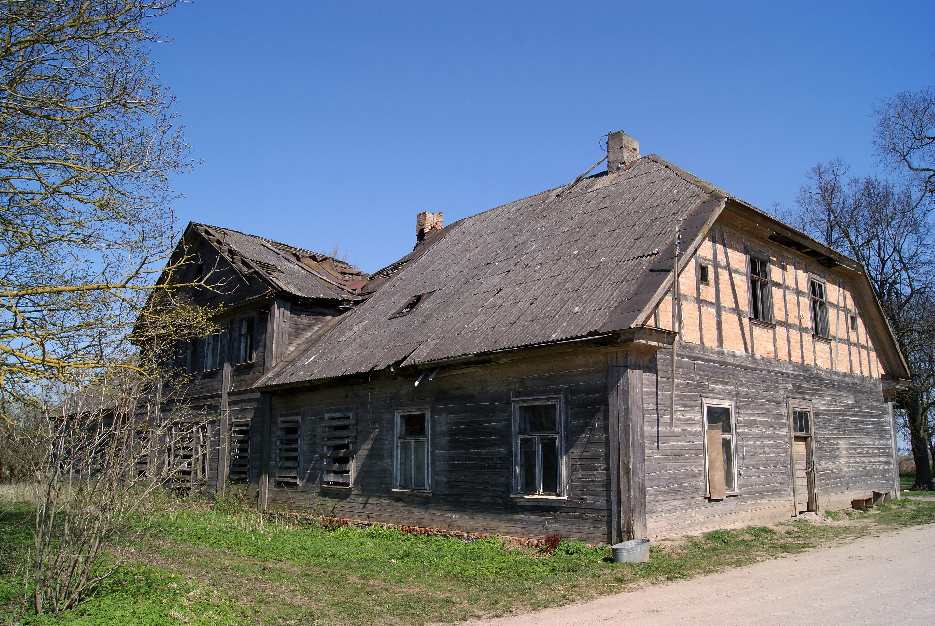 Daunoriške manor (Daunorava)